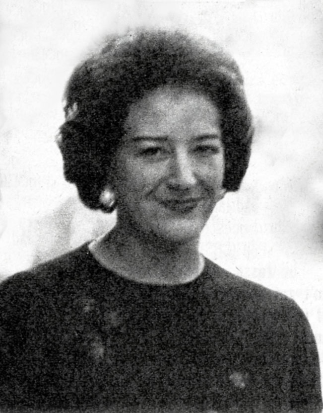 Maria Luisa Spaziani